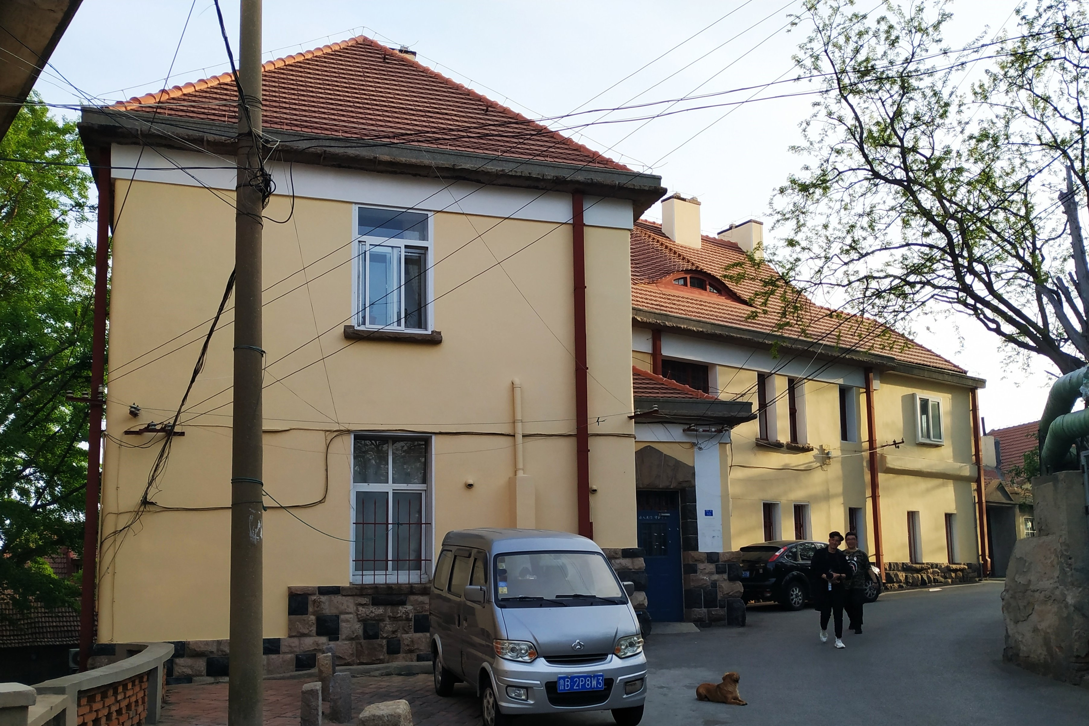 中文（中国大陆）: 蒋丙然故居